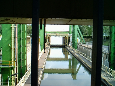 Trog des Schiffshebewerkes Rothensee aufgenommen von Marian Szengel